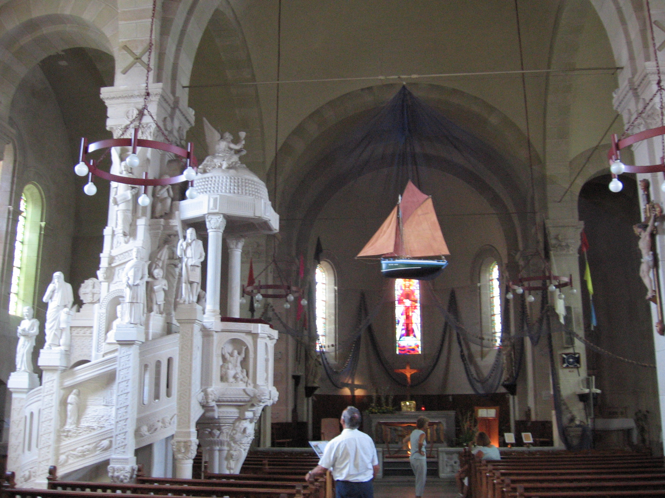 Saint-Gilles-Croix-de-Vie dans le département de la Vendée (France) : Chœur de l'église catholique Sainte-Croix, côté Croix de Vie, en juillet 2006.